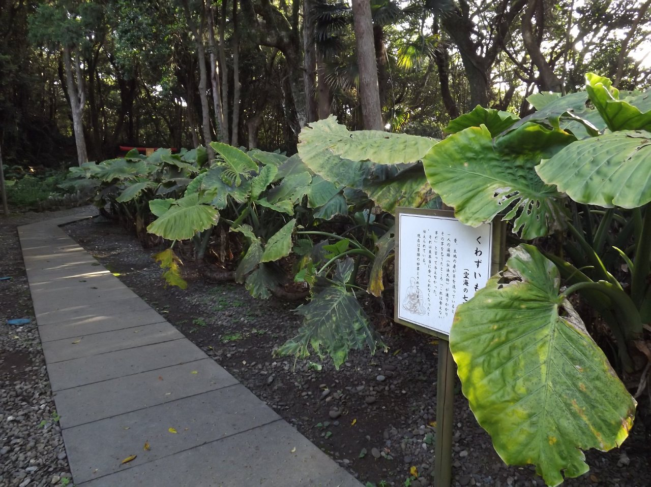 最御崎寺の食わず芋畑